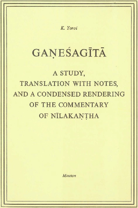 Обложка Ганеша-гиты издания 1968 года.